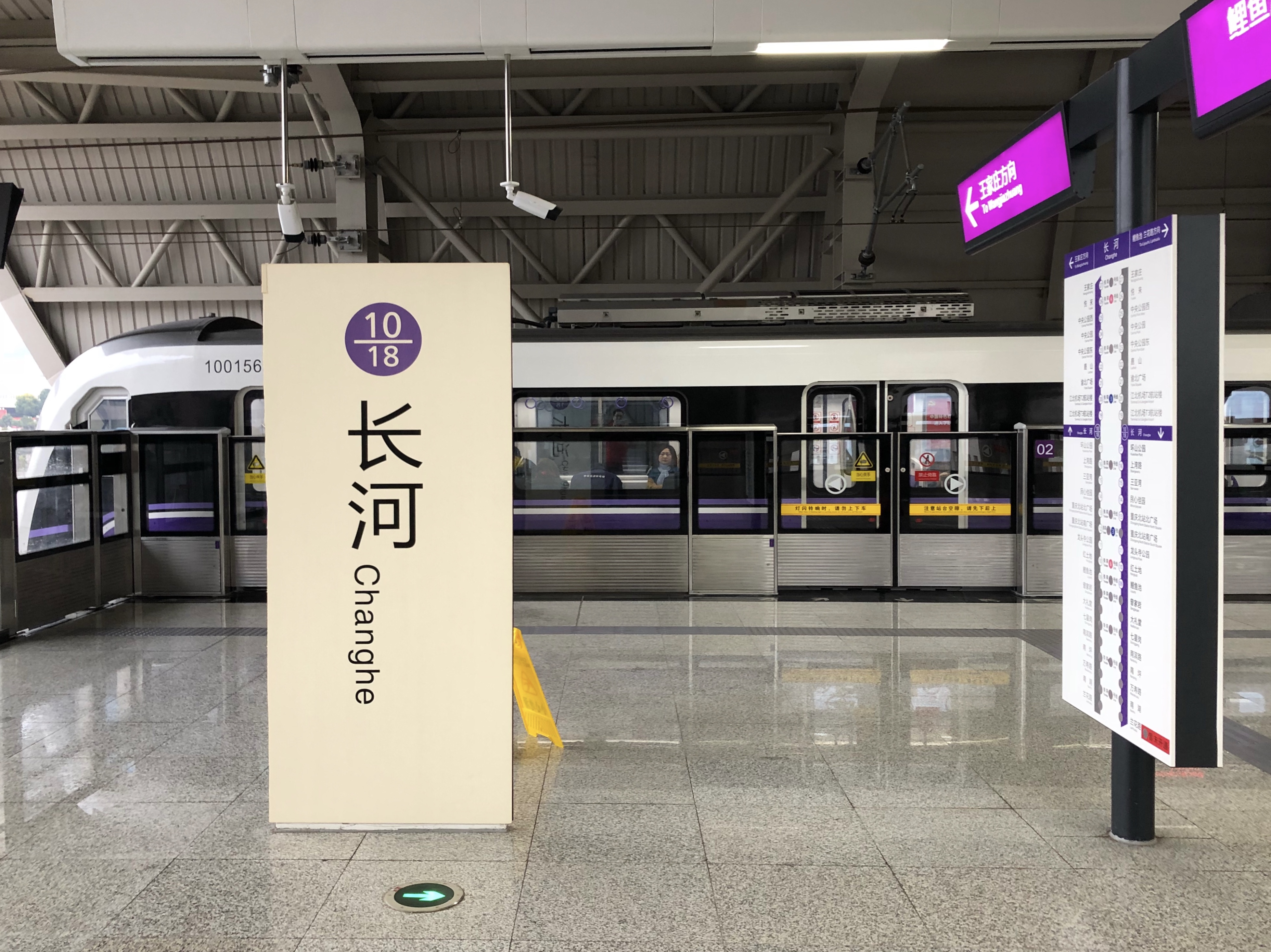 中文（中国大陆）: 10 号线长河站